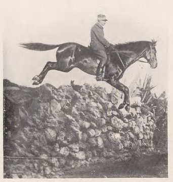 L'écuyer français du Cadre noir Etienne Beudant et son cheval Anglo-barbe Robertsart II